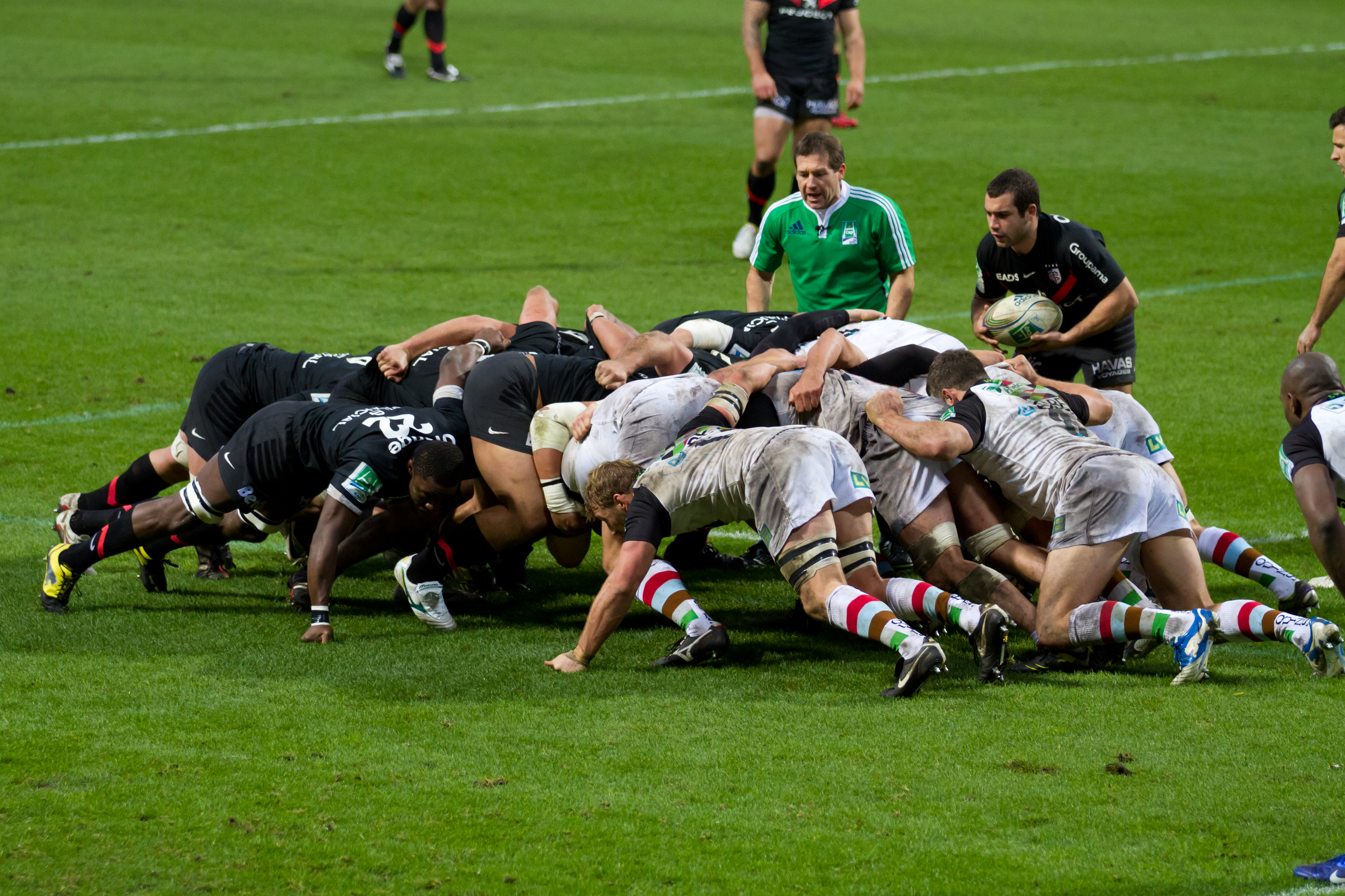 Heineken Cup 2011-2012 — 18 December 2011, Stadium. Match between: Stade toulousain — Harlequin F.C.